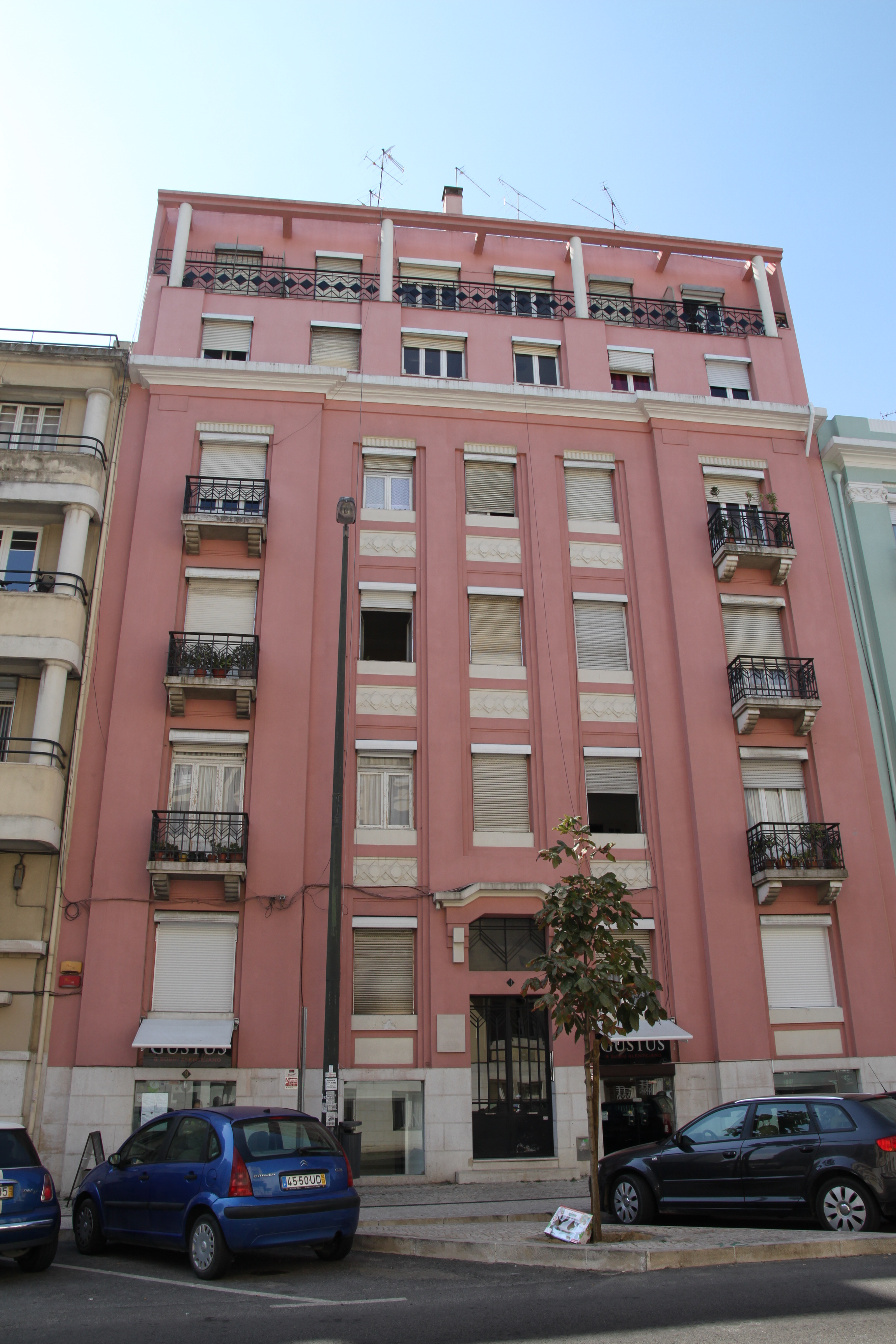 Bairro Azul This file was uploaded for Wiki Loves Monuments in Portugal with the unique identifier 336750.